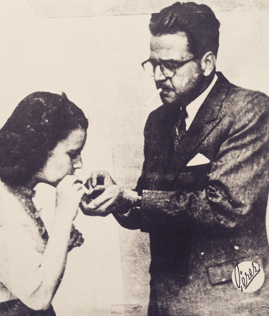 La poeta Ida Gramcko y el ensayista Mariano Picón Salas.